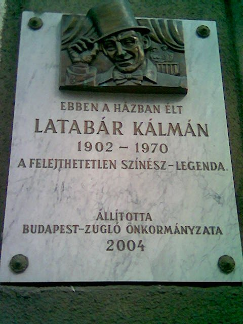 Latabár Kálmán emléktáblája Zuglóban; a Dózsa György út és az Abonyi utca sarkán álló társasház falán.